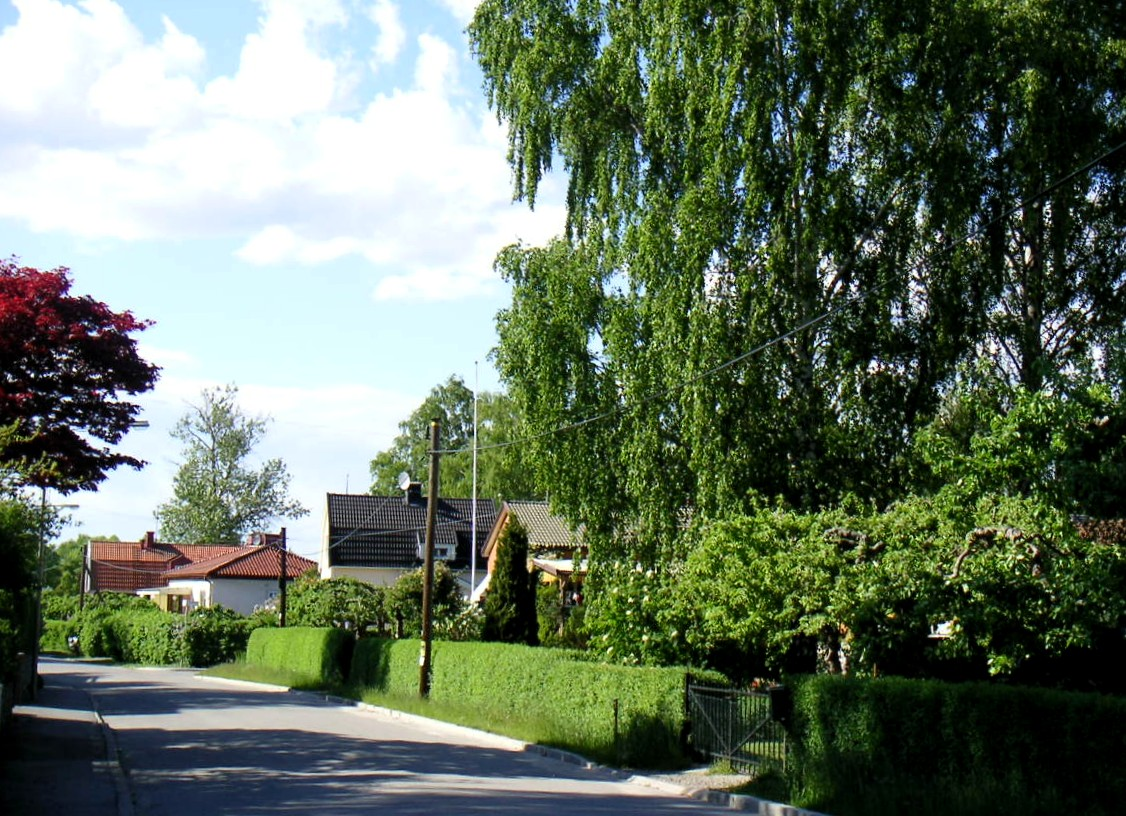 Uddeholmsvägen i Stureby, Stockholm